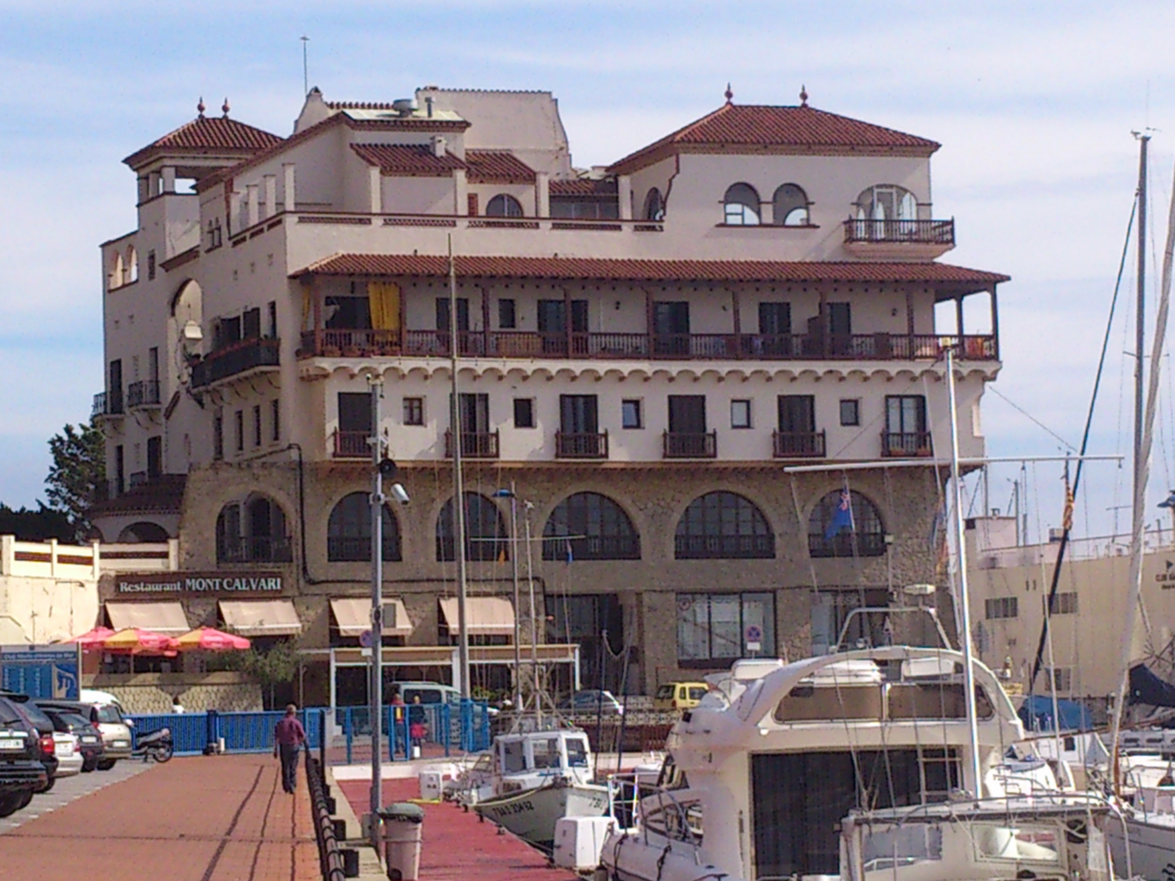 Montcalvari (Arenys de Mar)